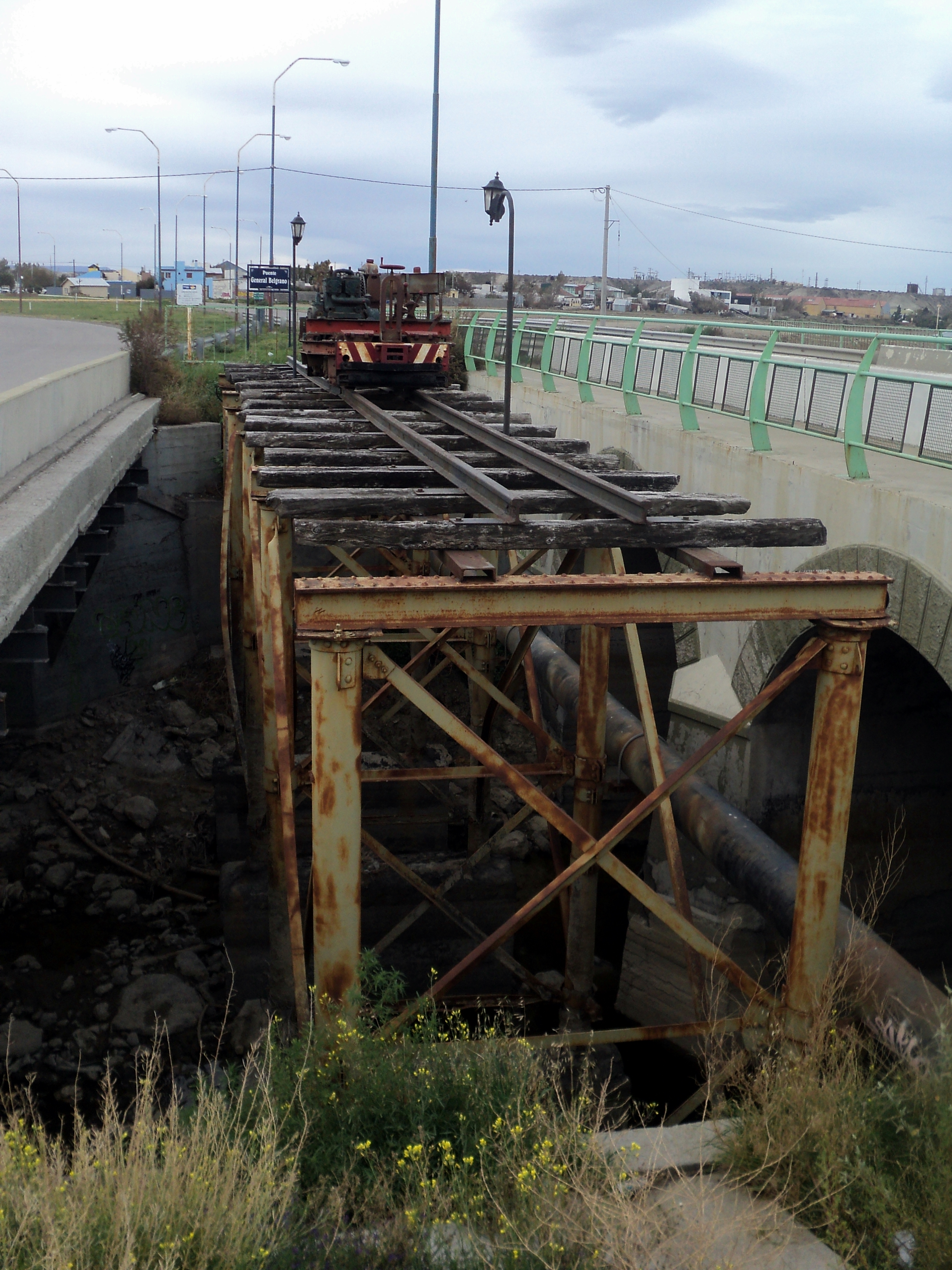 Monumento al ferrocarril en km 5 con la preservación del puente para tres y un bughi intacto sobre sus vias